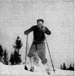 Stane Bervar.